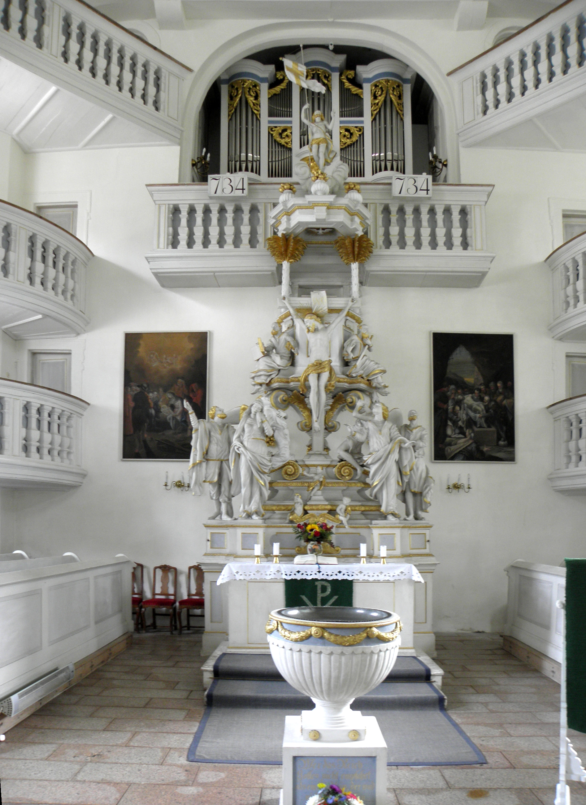 Carlsfeld, Trinitatiskirche, Innenansicht